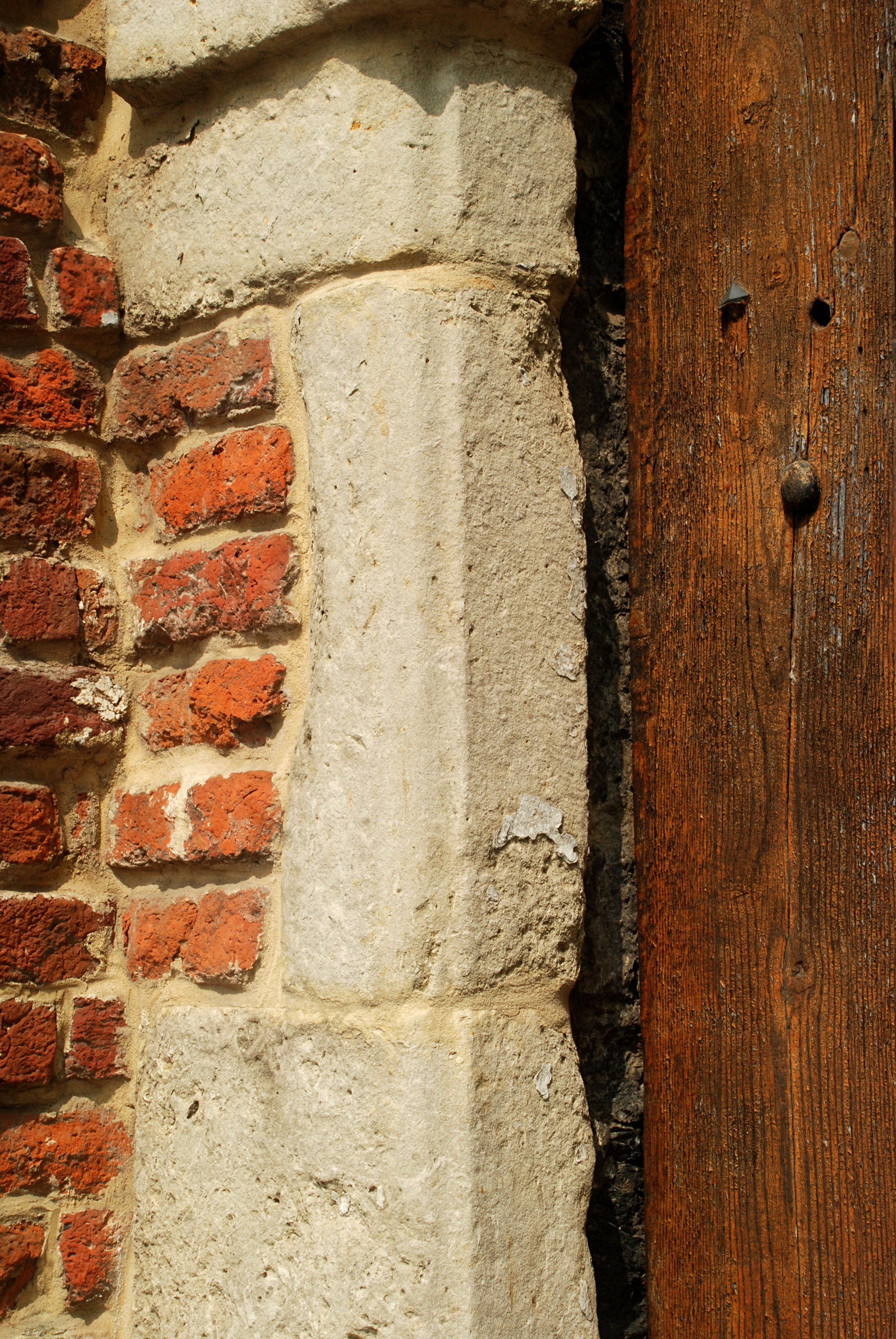 Belgique - Brabant wallon - Ottignies - Manoir de Franquenies